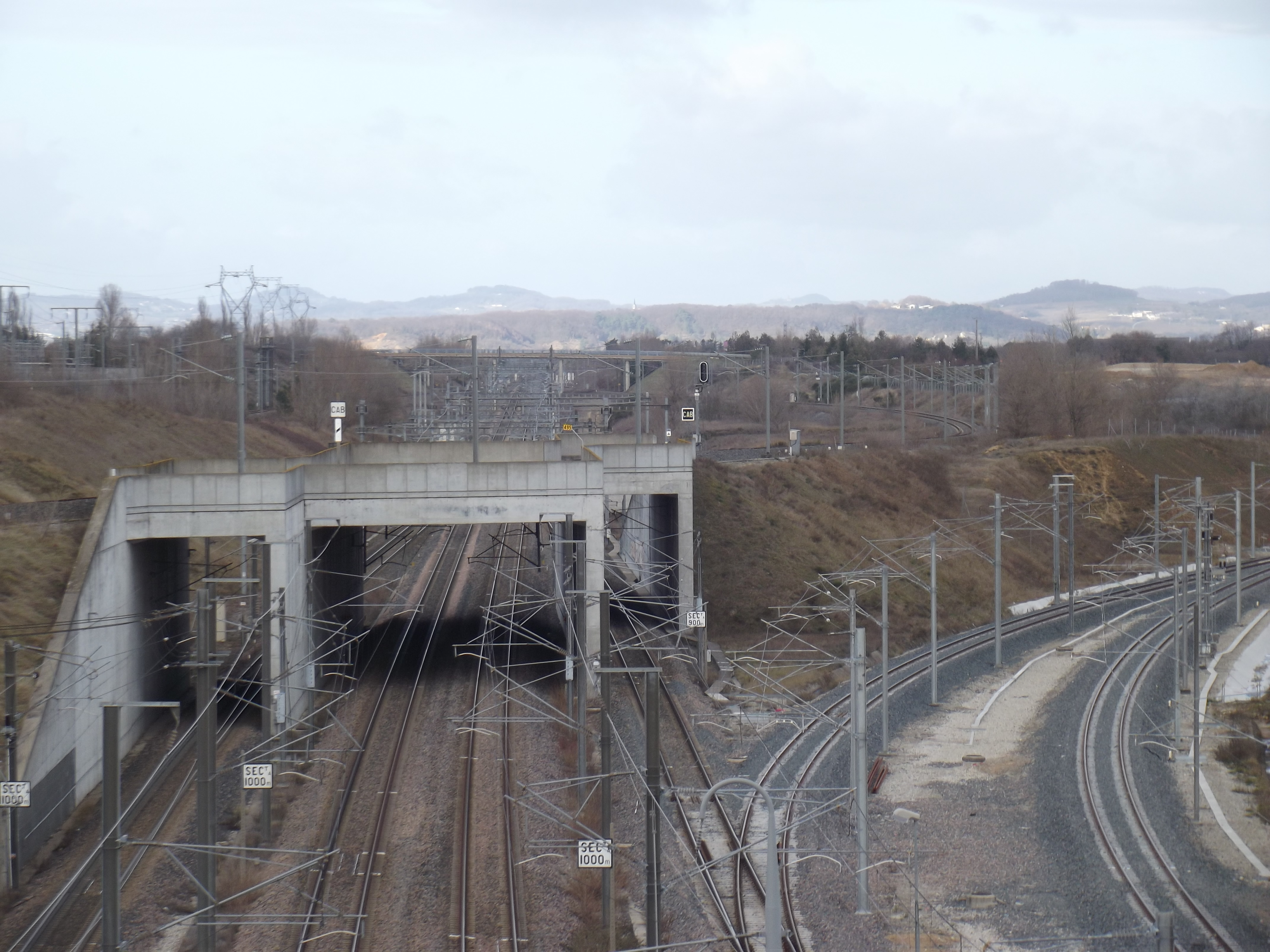 Toekomstige aansluiting met Valence - Grenoble spoorlijn